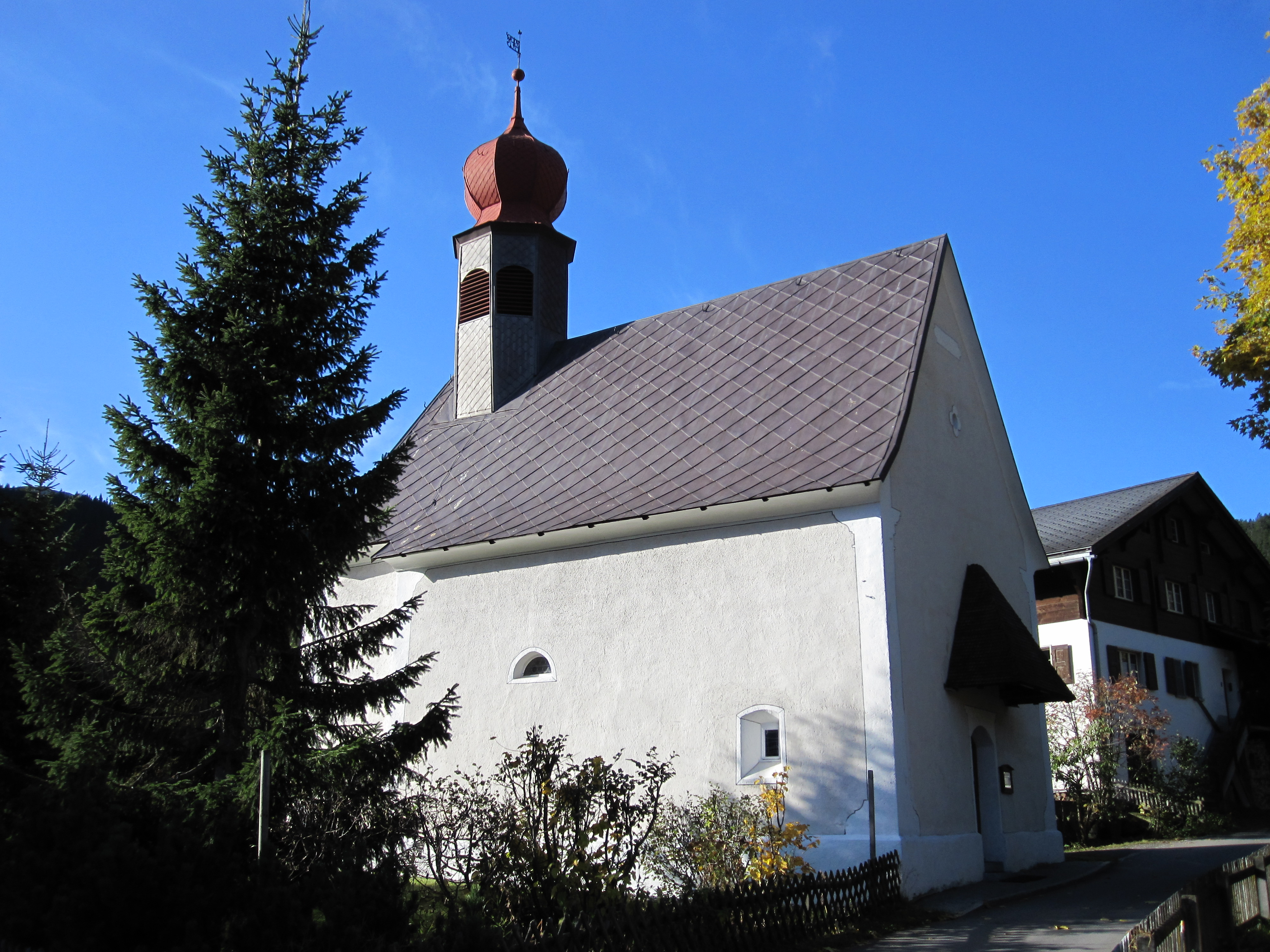 reformierte Kirche Davos Laret (Kanton Graubünden)